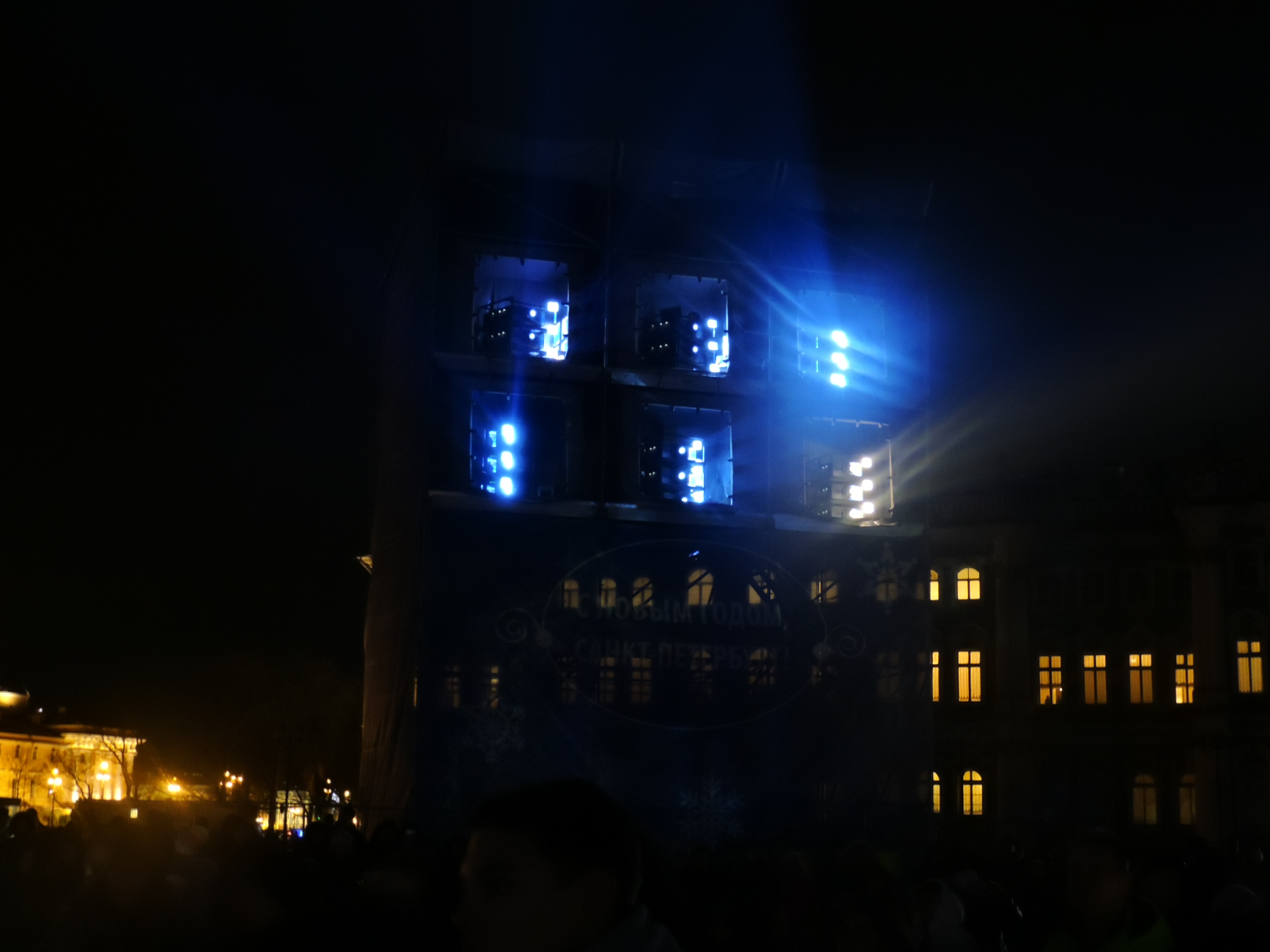 Устройство, проецирующее световые композиции на здание Главного штаба